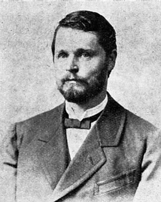 Matěj Norbert Vaněček (1859 - 1922), Český matematik a pedagog .